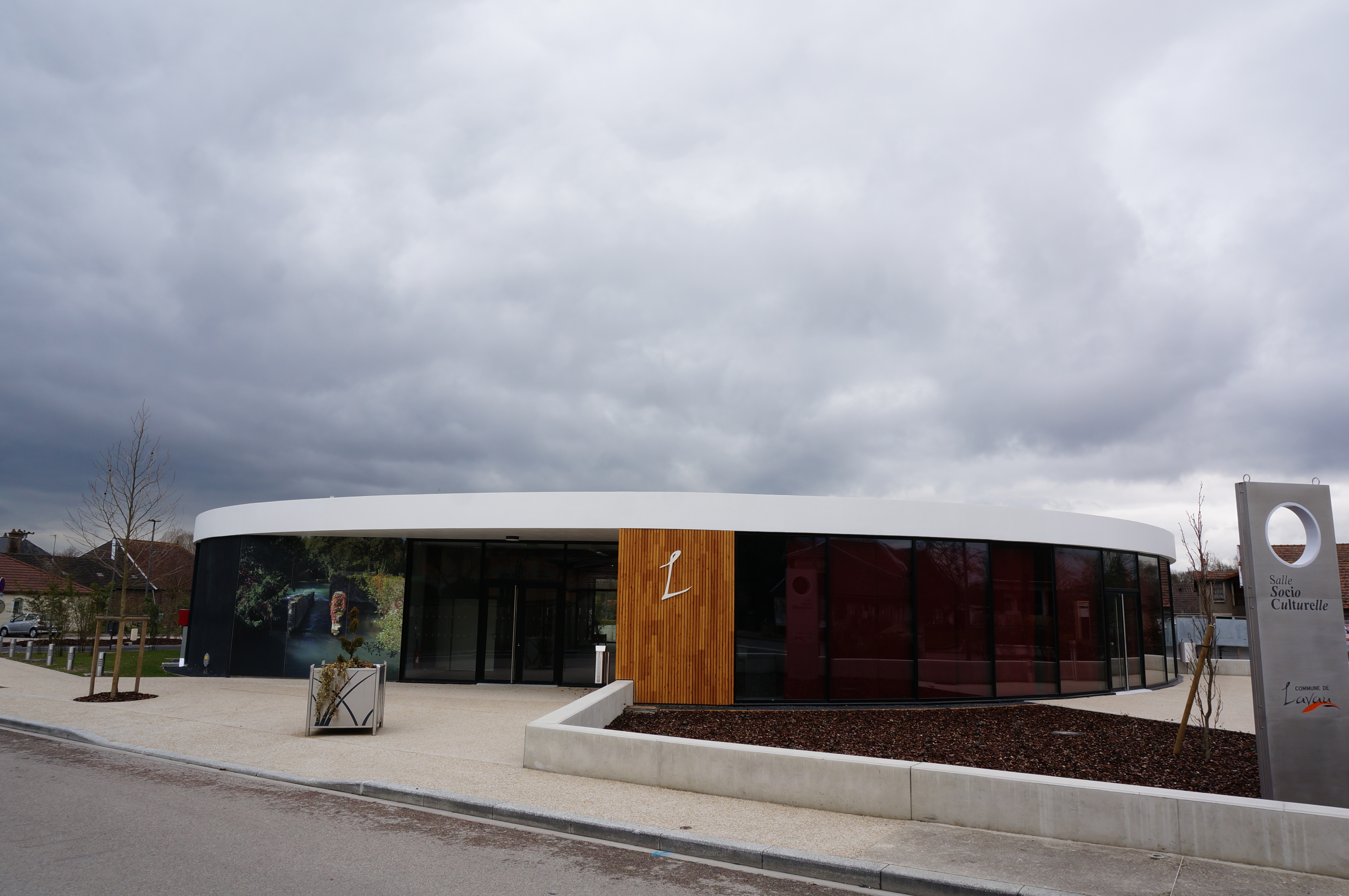 à Lavau.